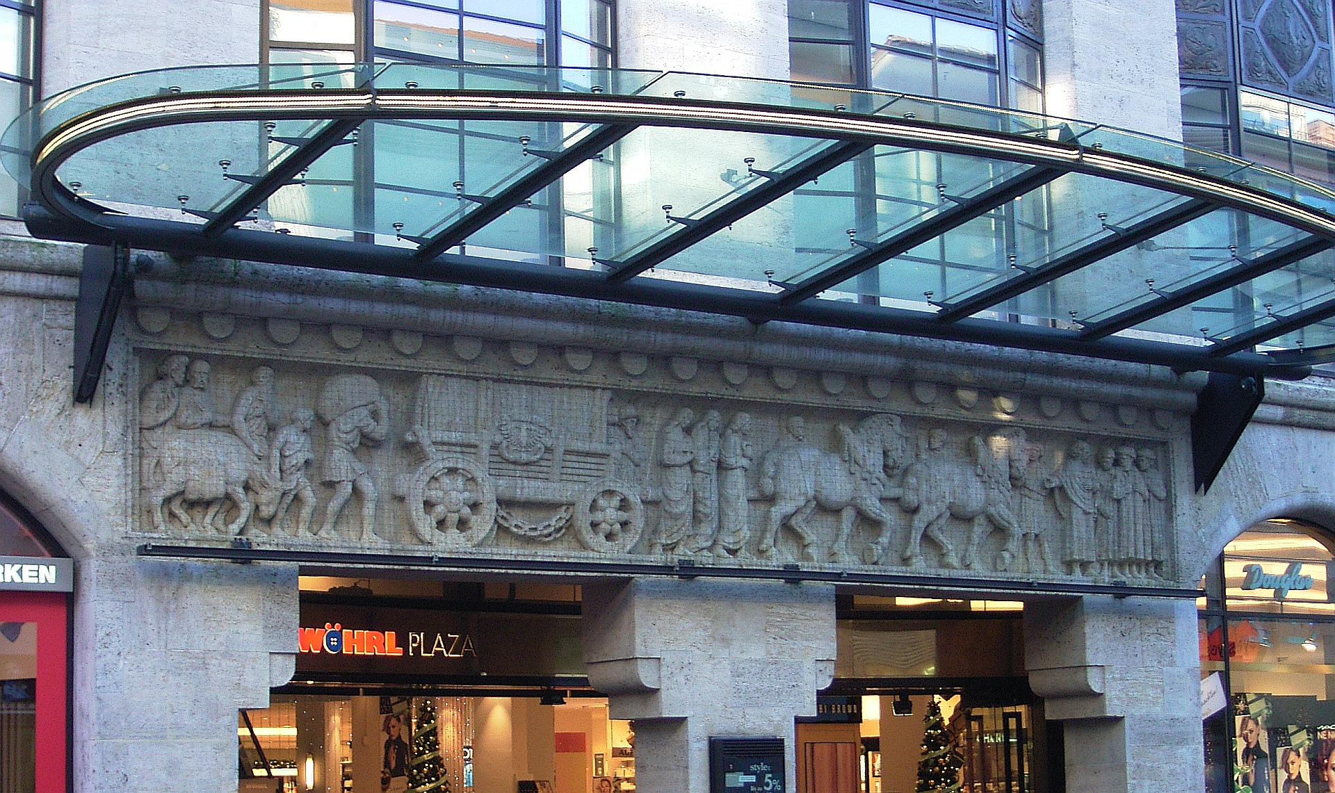 Relief "Kaufmannswagen", 1912, von Martin Scheible (1873-1954) am Kaufhaus Wöhrl-Plaza, Ulm, Hirschstraße